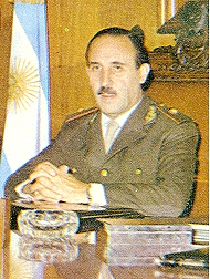 Fotografía tomada al ex Gobernador de Jujuy, Fernando Urdapilleta